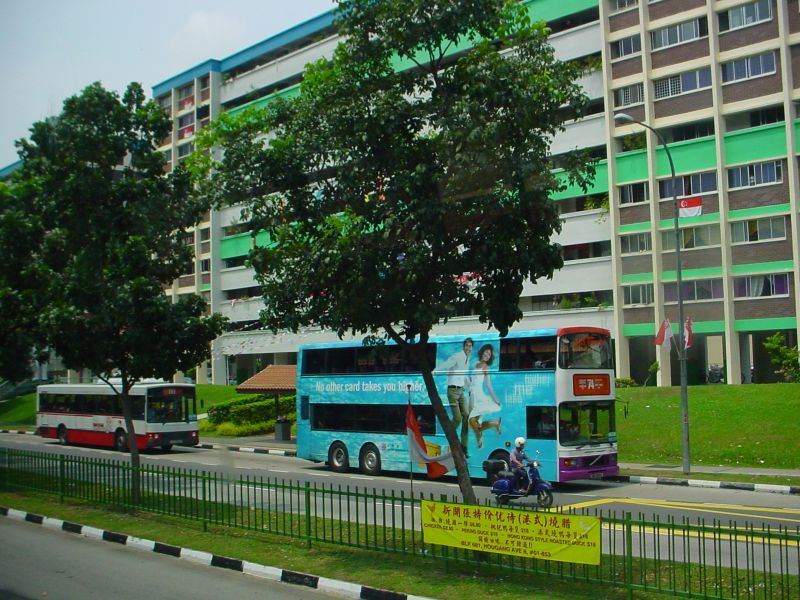 Flats in Hougang. By Timo Sippala 2002.